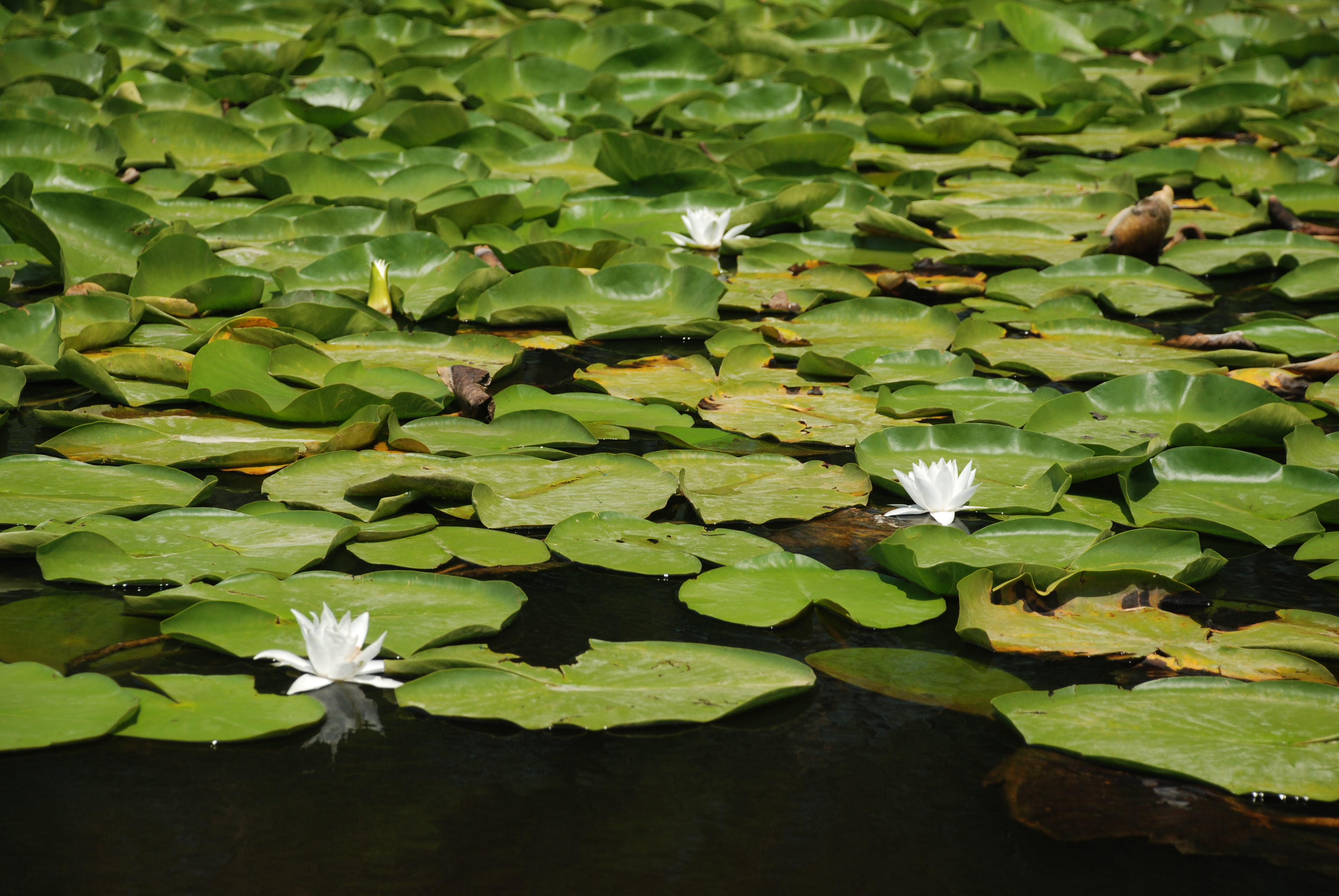 Acarlar Longoz Ormanı.